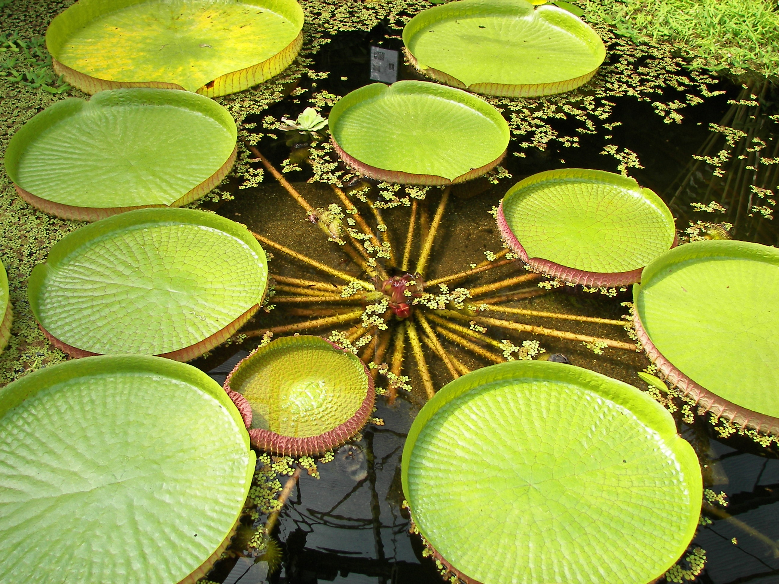 Riesenseerose (Victoria amazonica) im Neuen Botanischen Garten Marburg